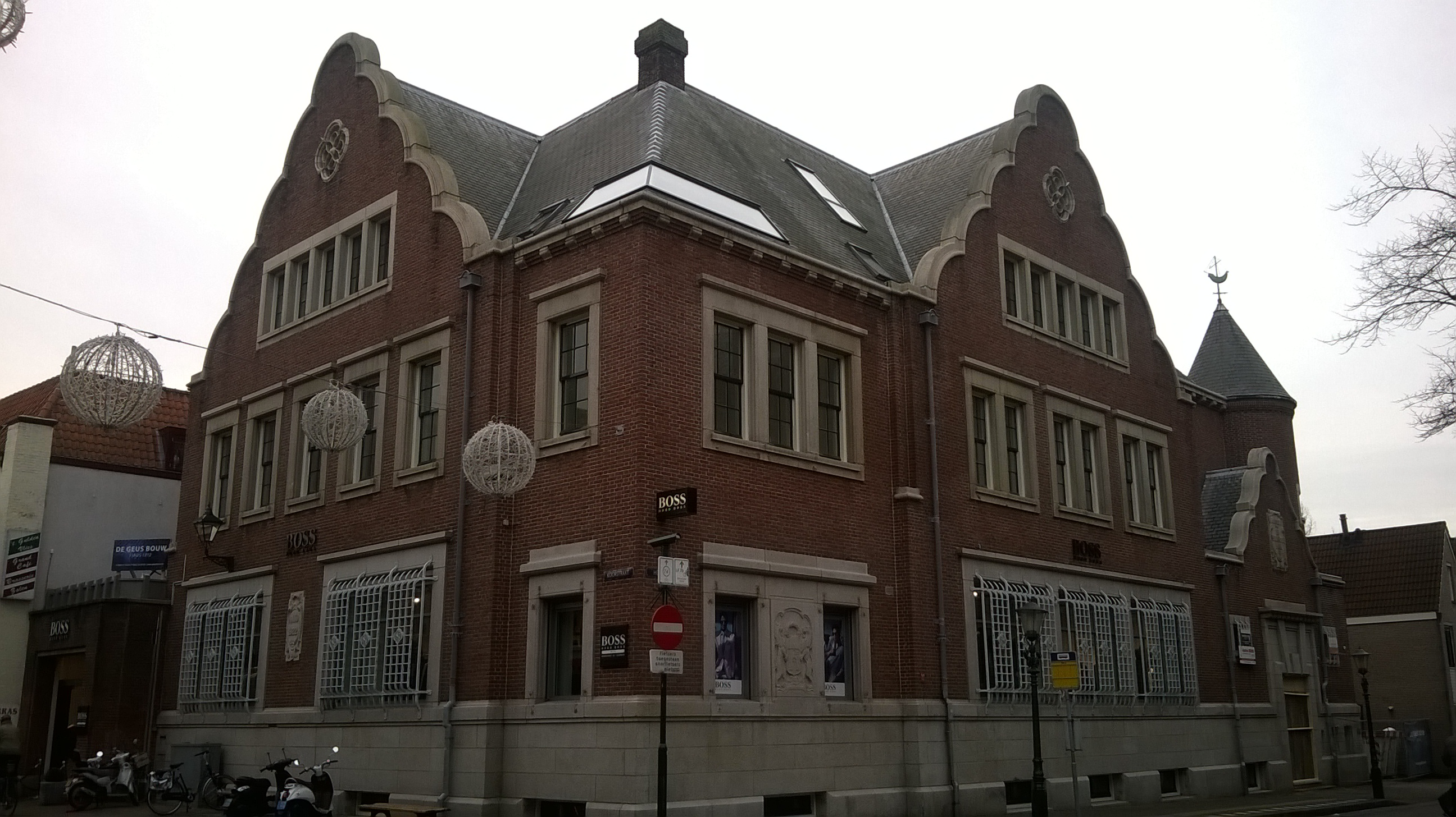 Voormalig agentschap van De Nederlandsche Bank op de hoek van de Koorstraat, Heul en Laat in Alkmaar. Foto genomen vanaf de Laat met links de Koorstraat en rechts de Heul.